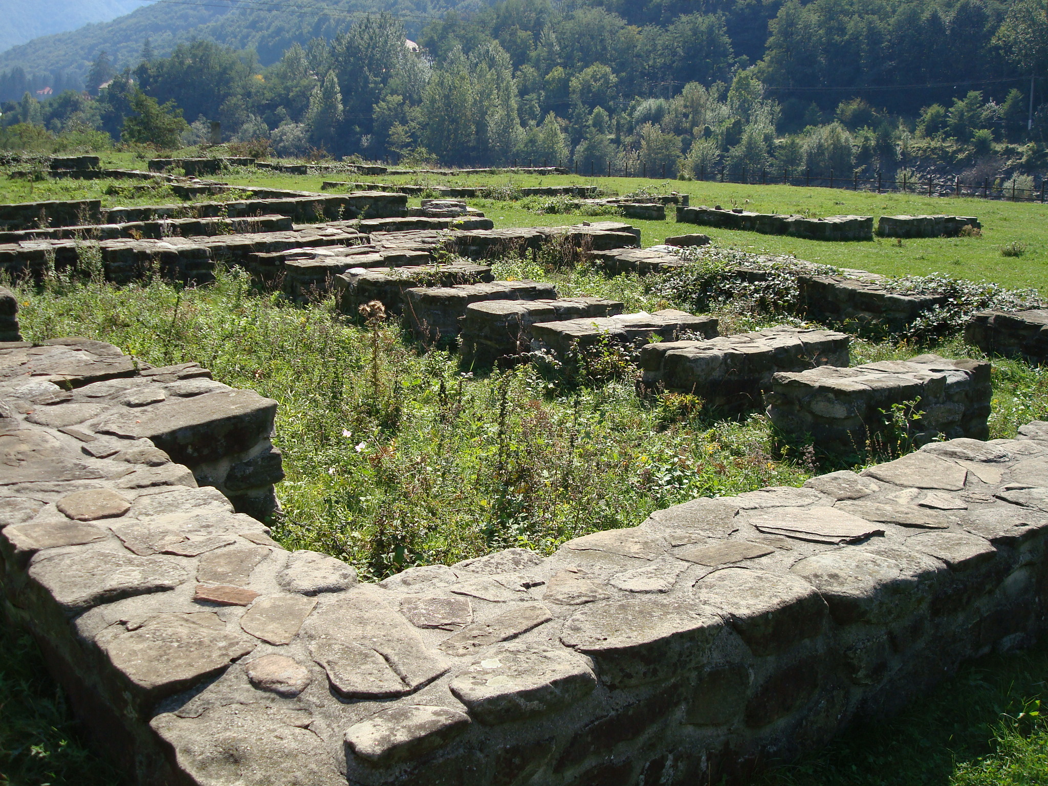 Castrul roman Arutela